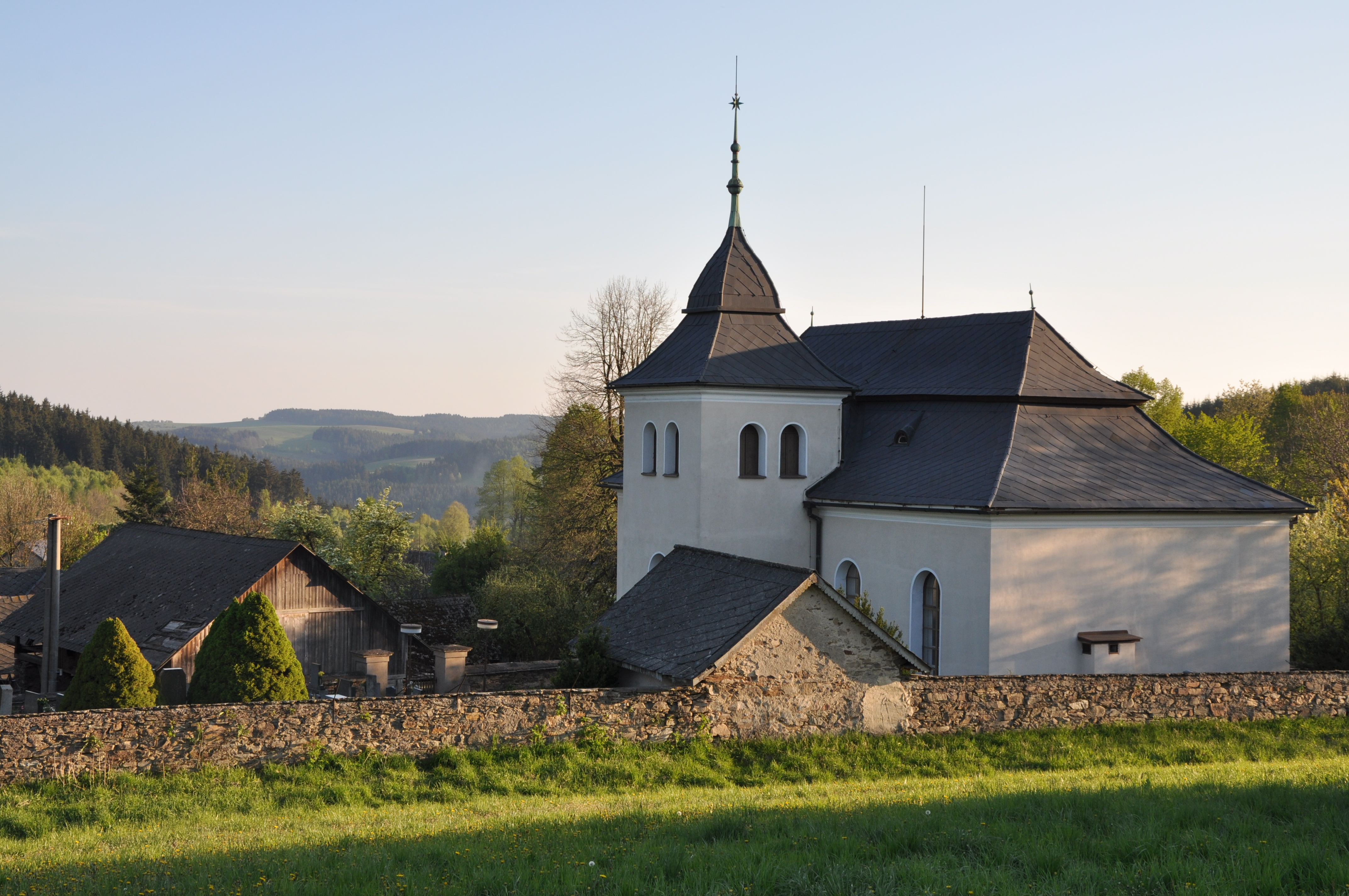 Evangelický kostel ve Veselí